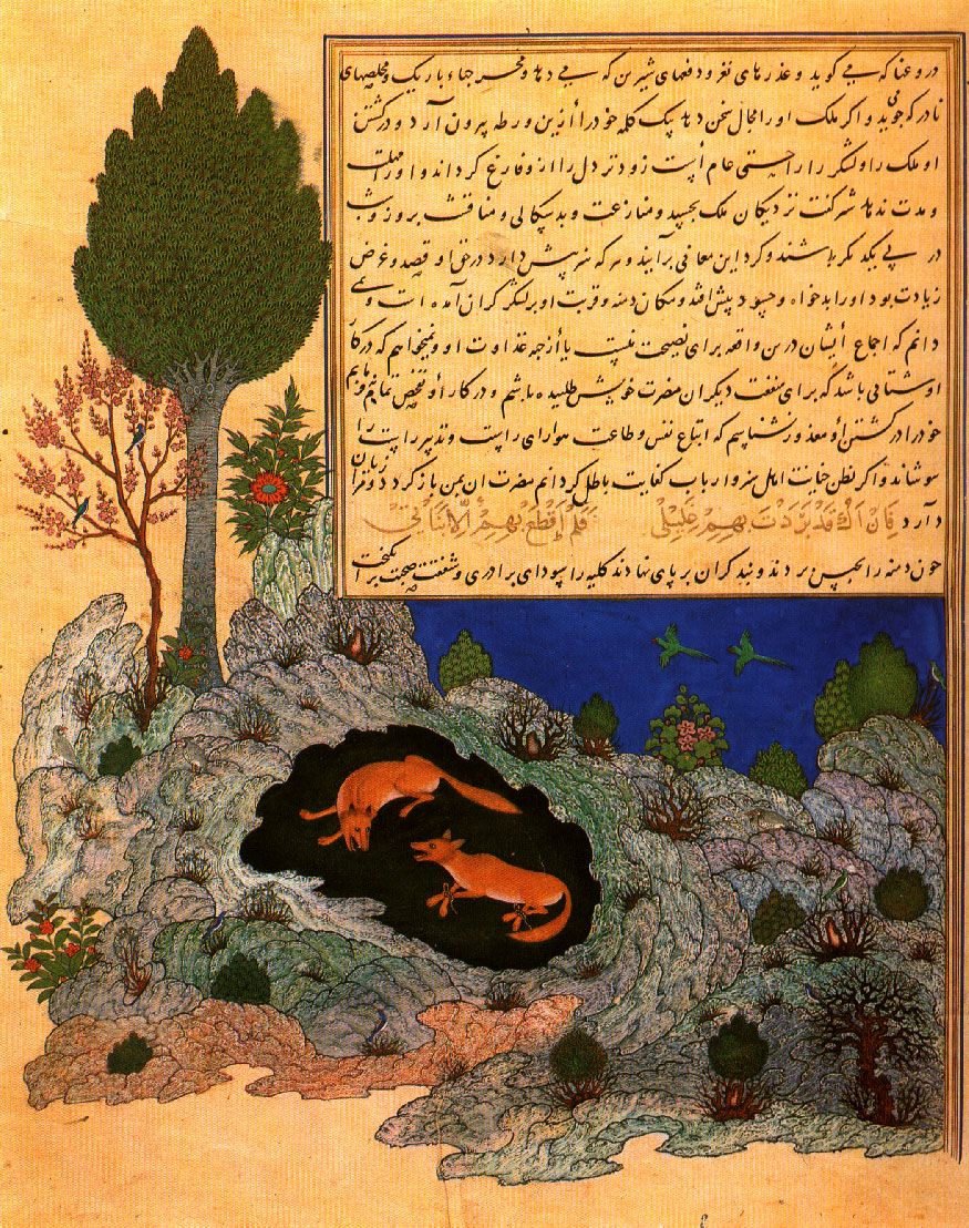 کلیله و دمنه (دو شغال اصلی داستان)، کلیله و دمنهٔ بایسنقری، مکتب هرات، کتابخانهٔ موزهٔ توپقاپی استانبول، خزینهٔ ۱۰۲۲.